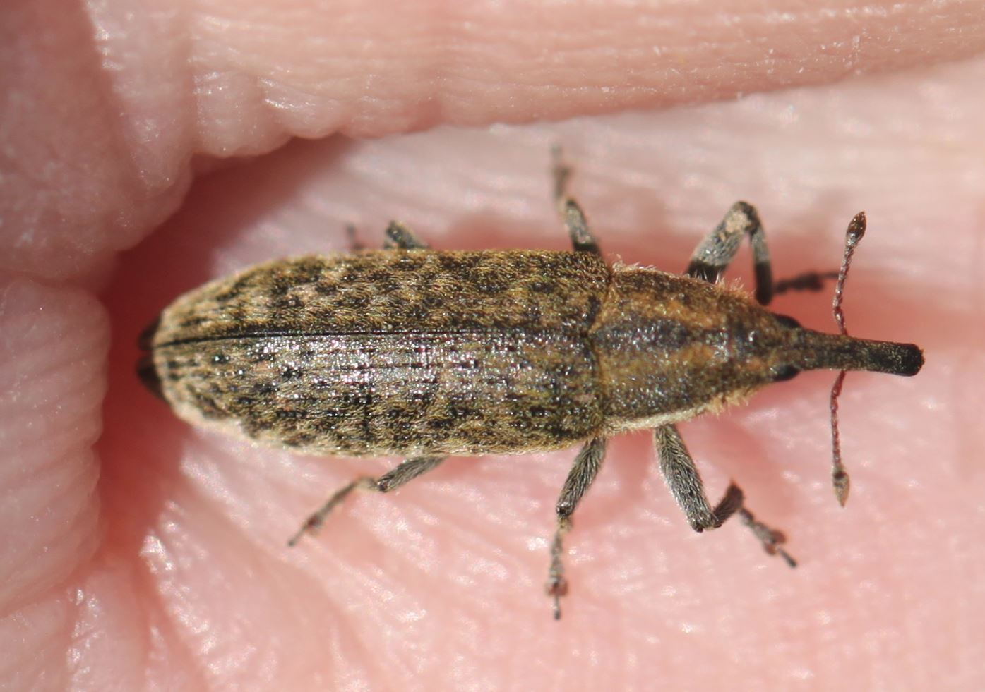 Rüsselkäfer Lixus filiformis am 15. Mai 2019 in Walldorf/Baden an Ackerkratzdistel